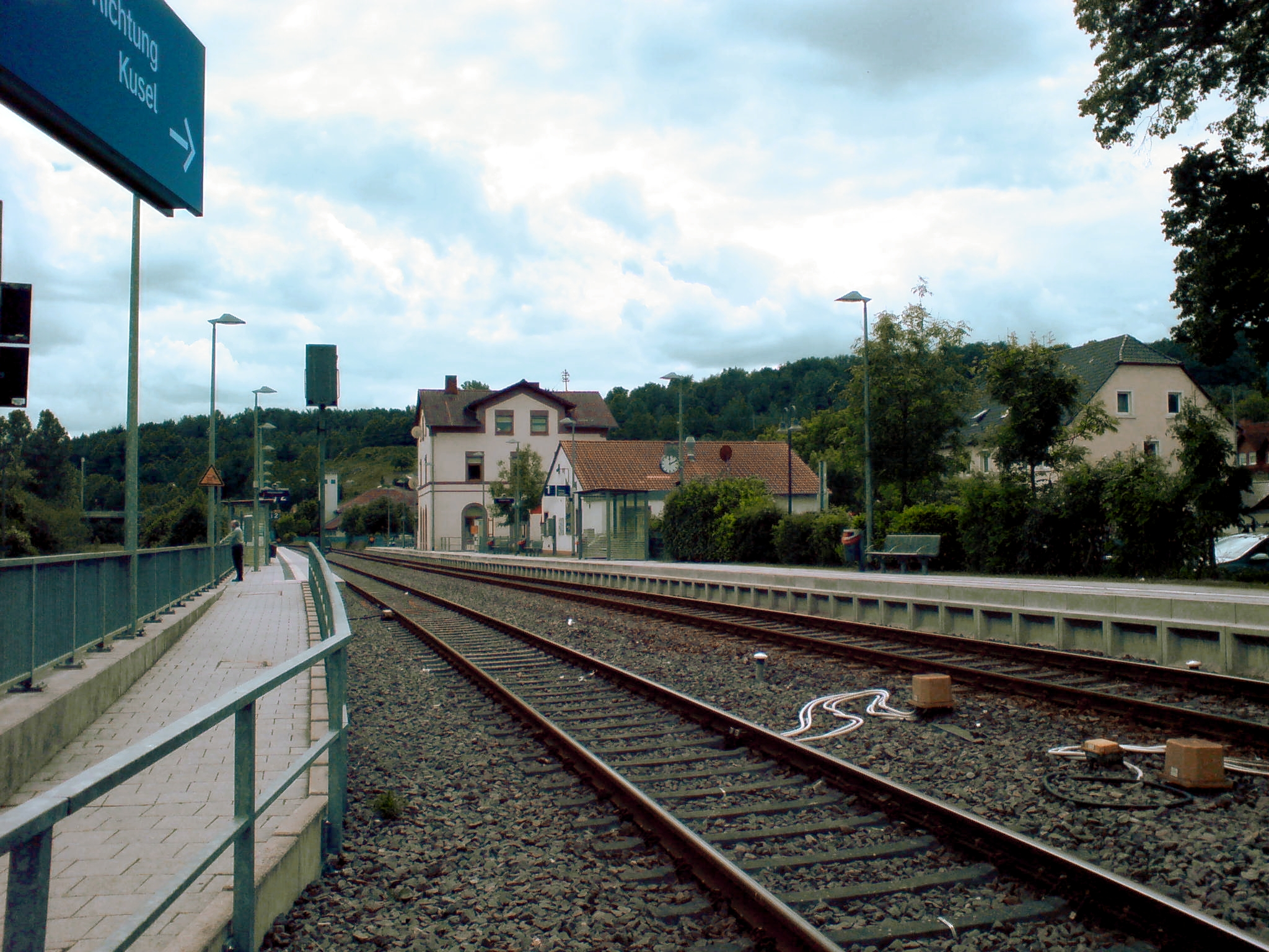 Gesamtansicht Bahnhof Glan-Münchweiler.